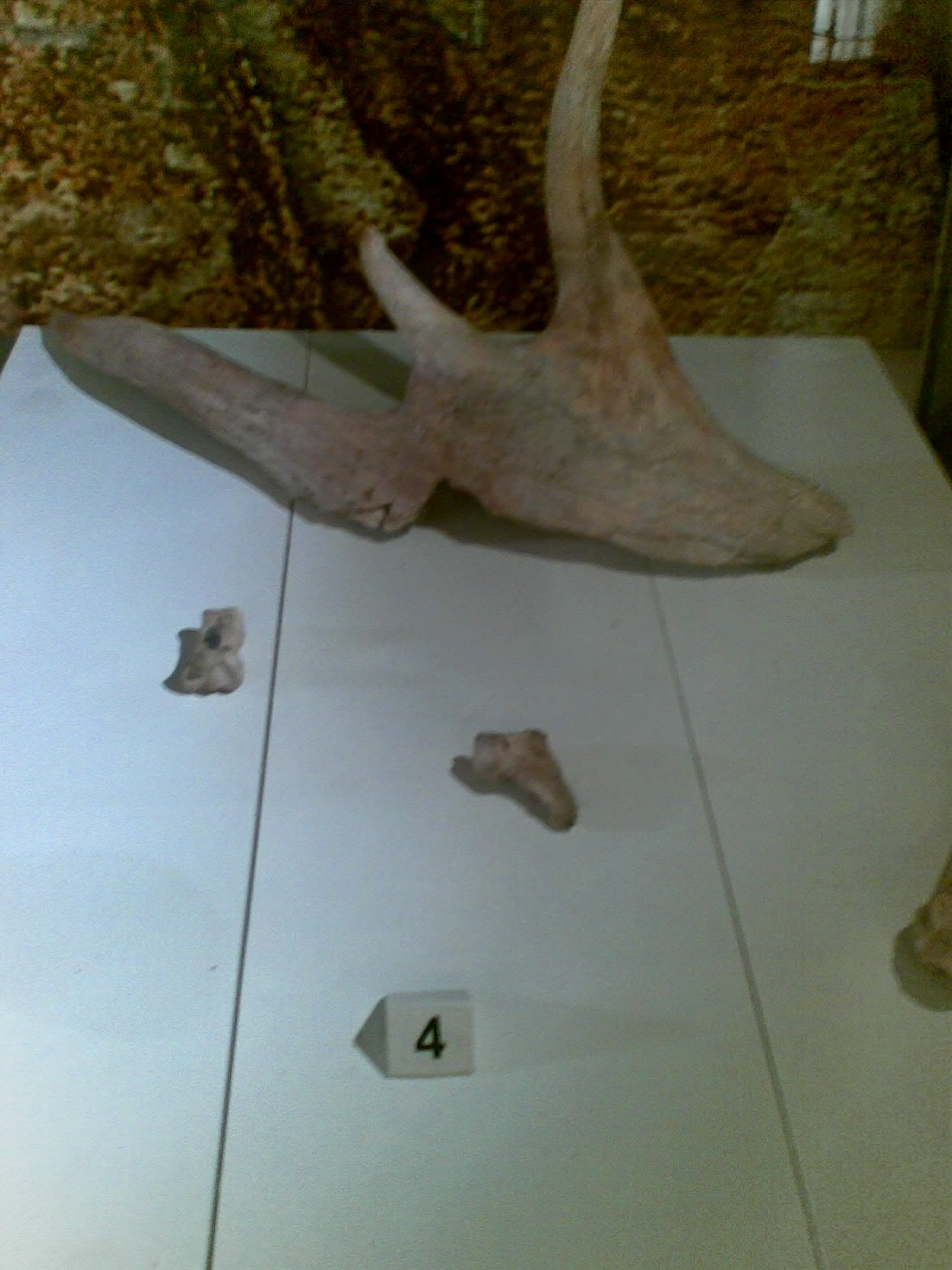 Azıx mağarasından aşkarlanmış maral sümükləri